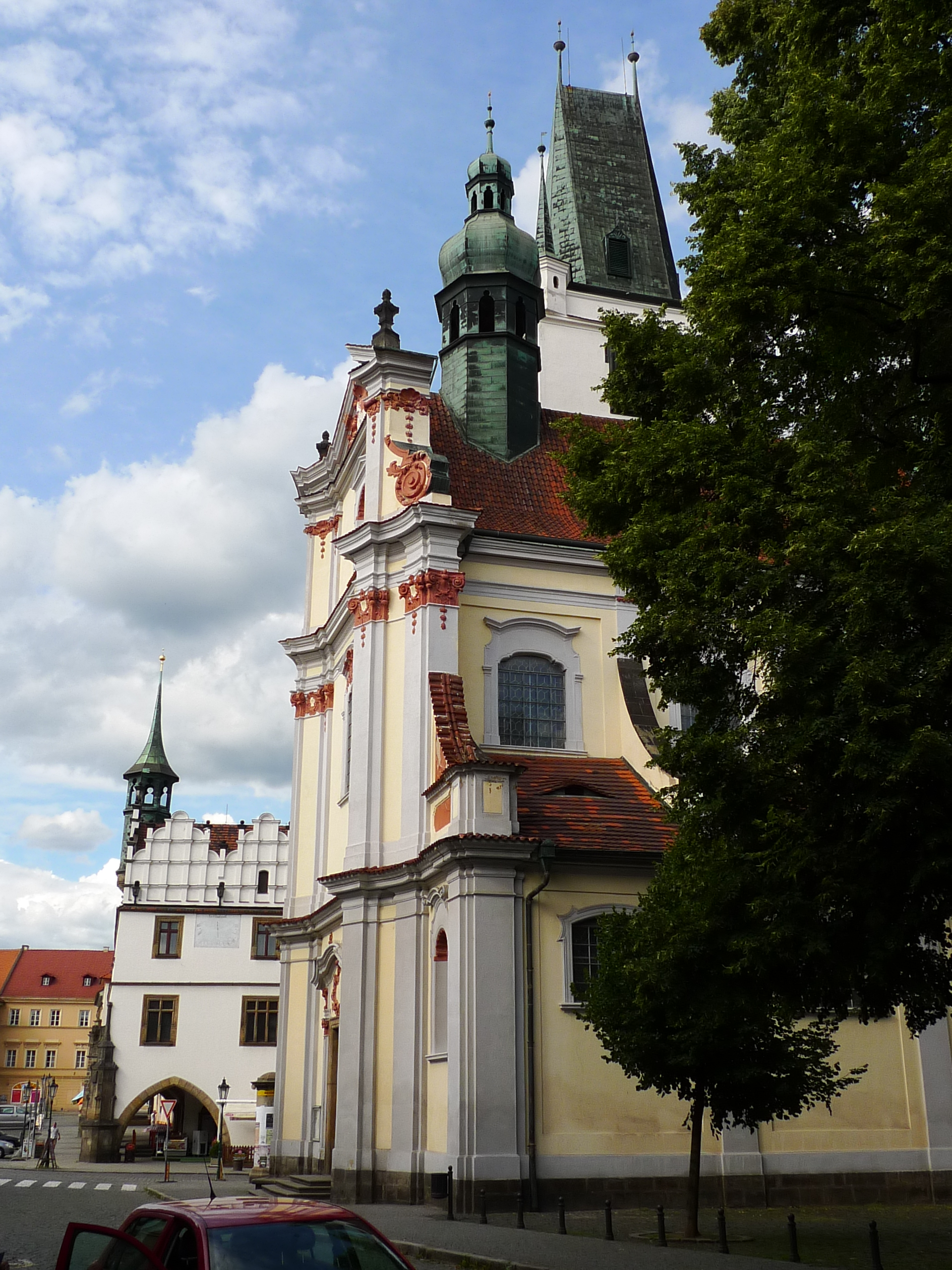 Kostel Všech svatých, Dlouhá čp. 196, Litoměřice-Město, Litoměřice.